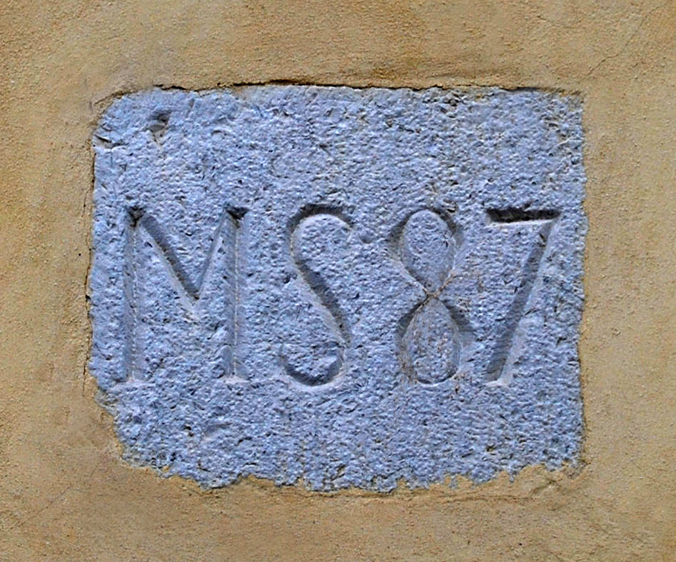 Castel Goffredo, lapide sulla Chiesa dei Disciplini, riportante l'anno 1587 data di ultimazione dell'edificio.